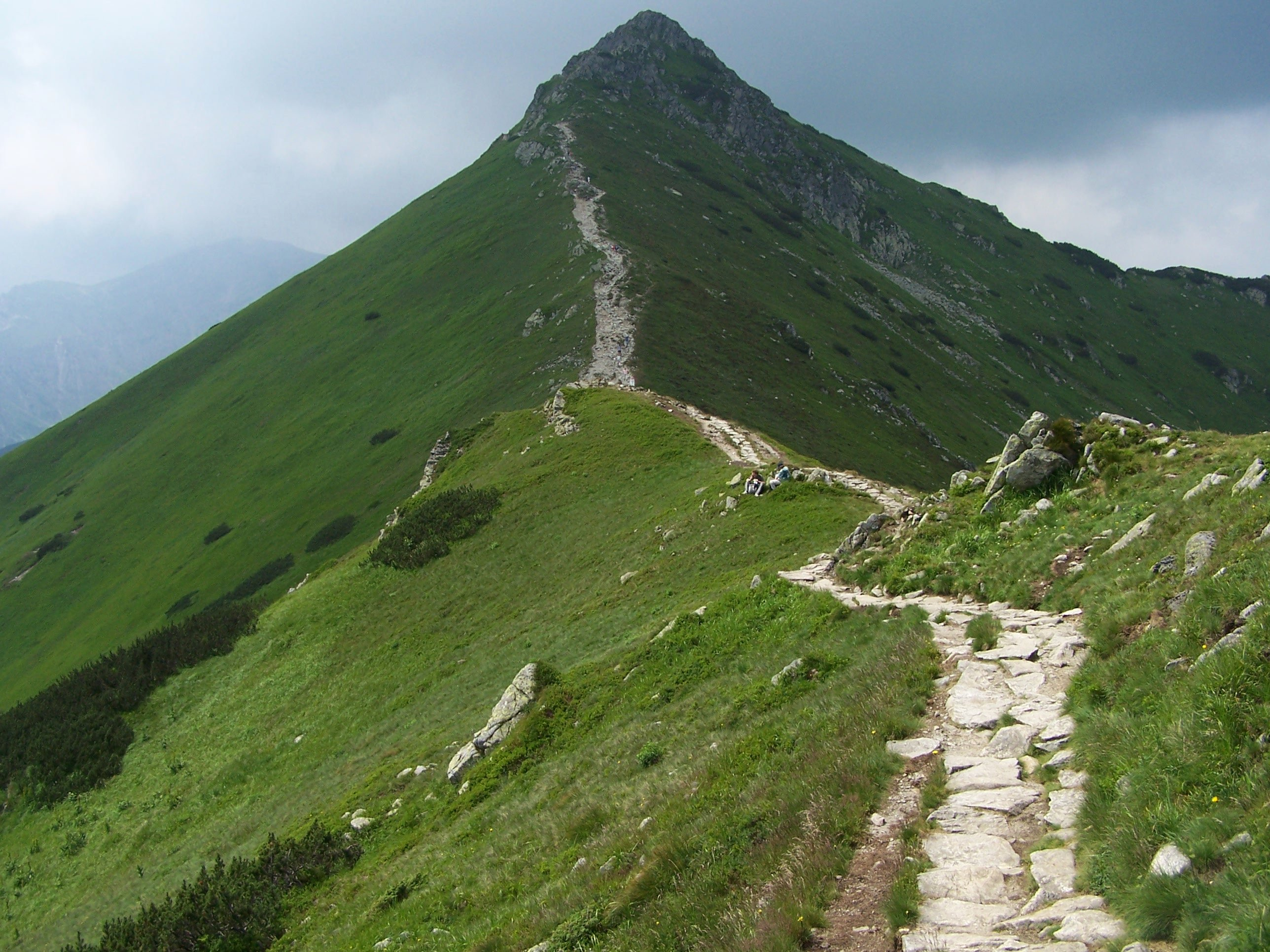 Goryczkowa Czuba (West Tatra Mountains)